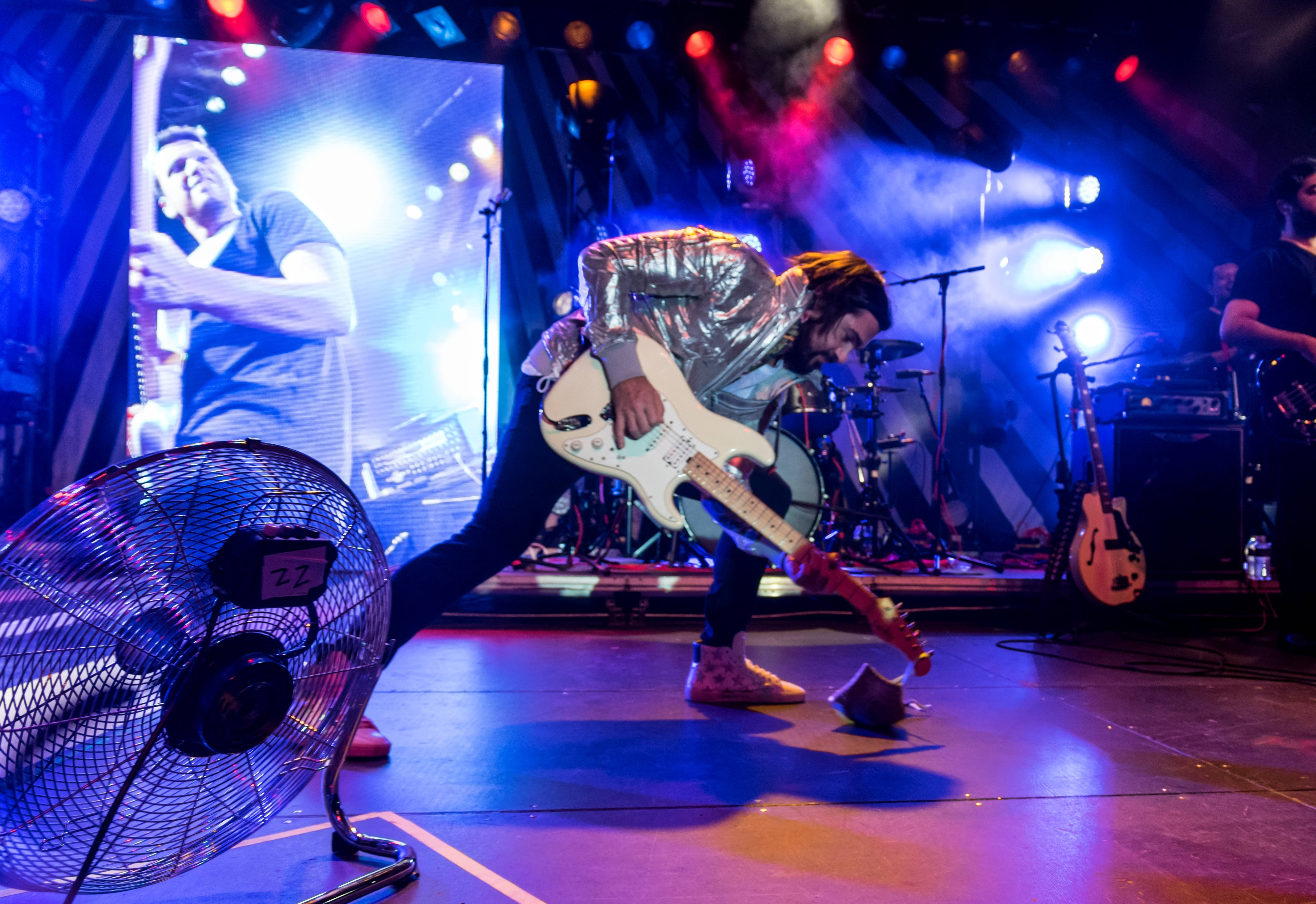 Bilder vom ZMF 2015 JUANES am 18. Juli 2015